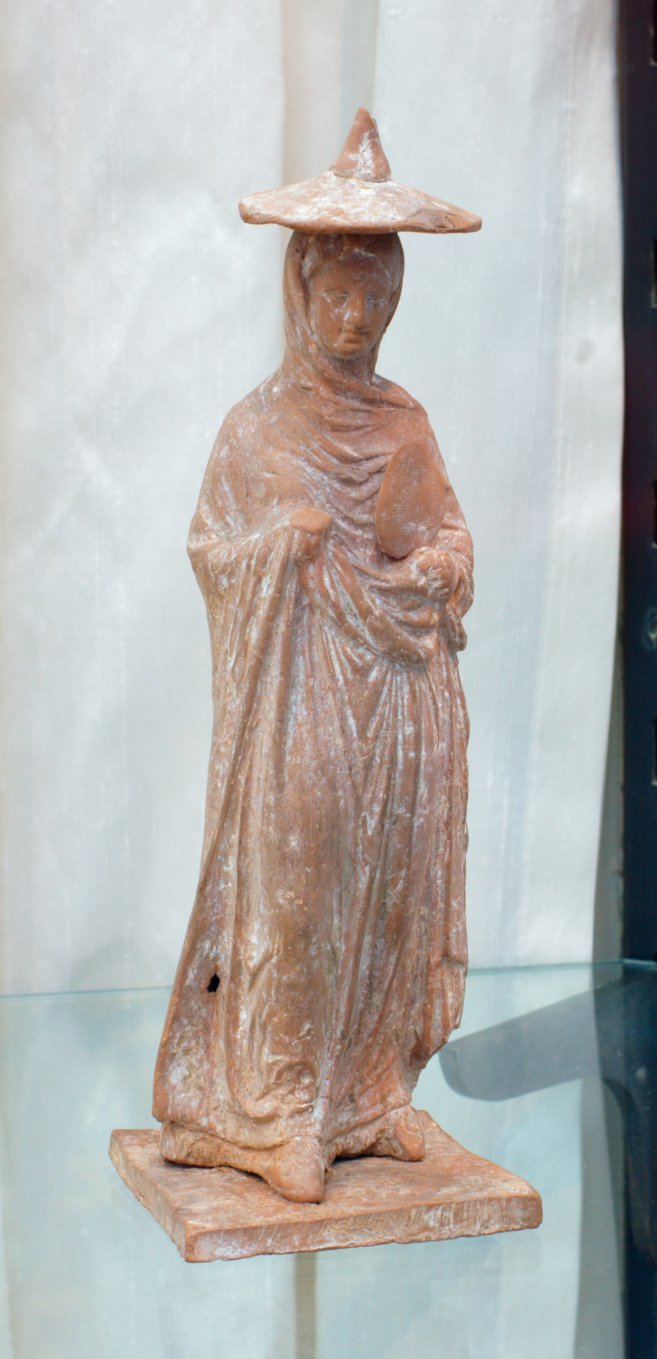 Griechische Terrkotta .